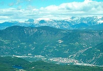 Foto di Laives (BZ) con i laghi di Monticolo in primo piano (visti dalla Mendola). In primo piano, a sinistra si vedono il Piccolo e il Grande lago di Monticolo (facenti parte del comune di Appiano sulla strada del vino). Sulla sfondo si vede al centro lo Sciliar (ted.:Schlern) e verso destra il Catinaccio (ted.:Rosengarten). La località leggermente staccata, verso nord, è la frazione Pineta di Laives (ted.:Steinmannswald). La montagna a ridosso del paese è il Monte Pozza (ted. Stadlegg) di cui è parte il Colle (ted.Kohlern). La foto è stata fatta a metà maggio 2004 dal monte Lira, tra il passo della Mendola e il monte Roen.